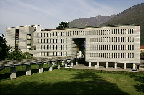 "Baloîse"-Versicherungs-Gebäude in Bellinzona